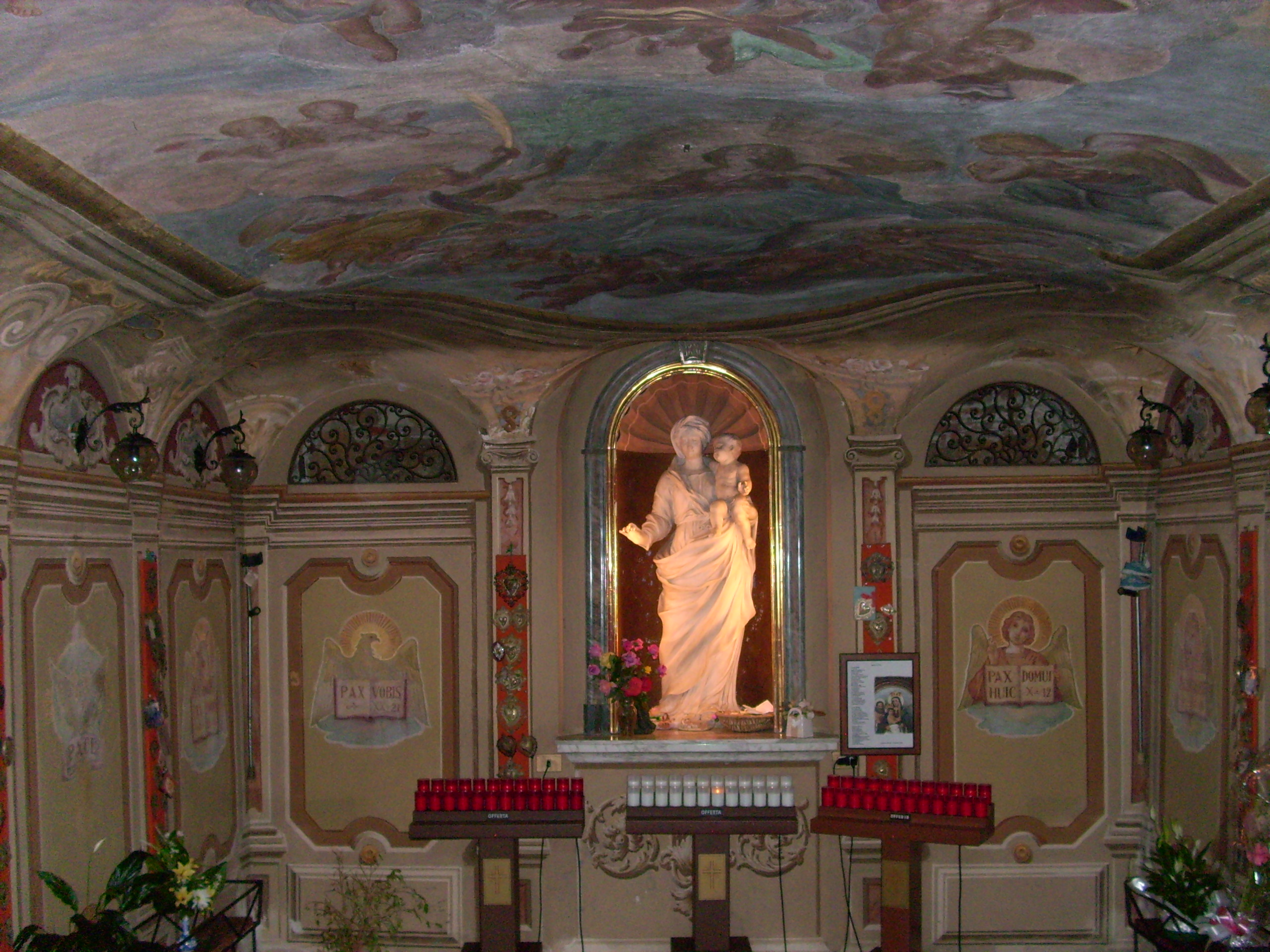 Santuario di Nostra Signora della Pace presso Albisola Superiore, Liguria, Italia